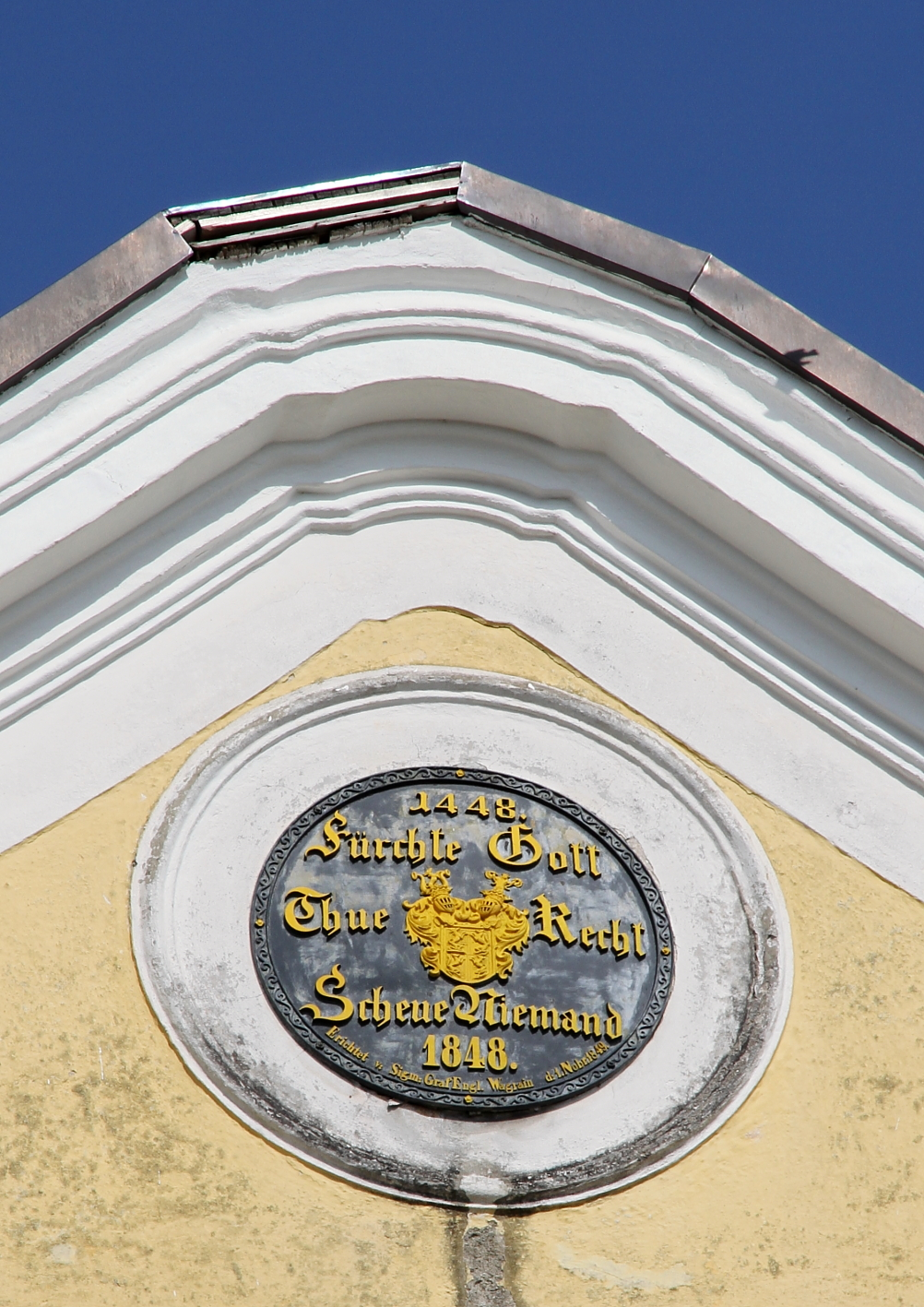 Wappen der Familie Engel am südseitigen Giebel des ehemaligen Schlosses Wagrain in der oberösterreichischen Stadt Vöcklabruck. Der umgebende Spruch lautet „1448 Fürchte Gott, Tue Recht, Scheue Niemand 1848“.